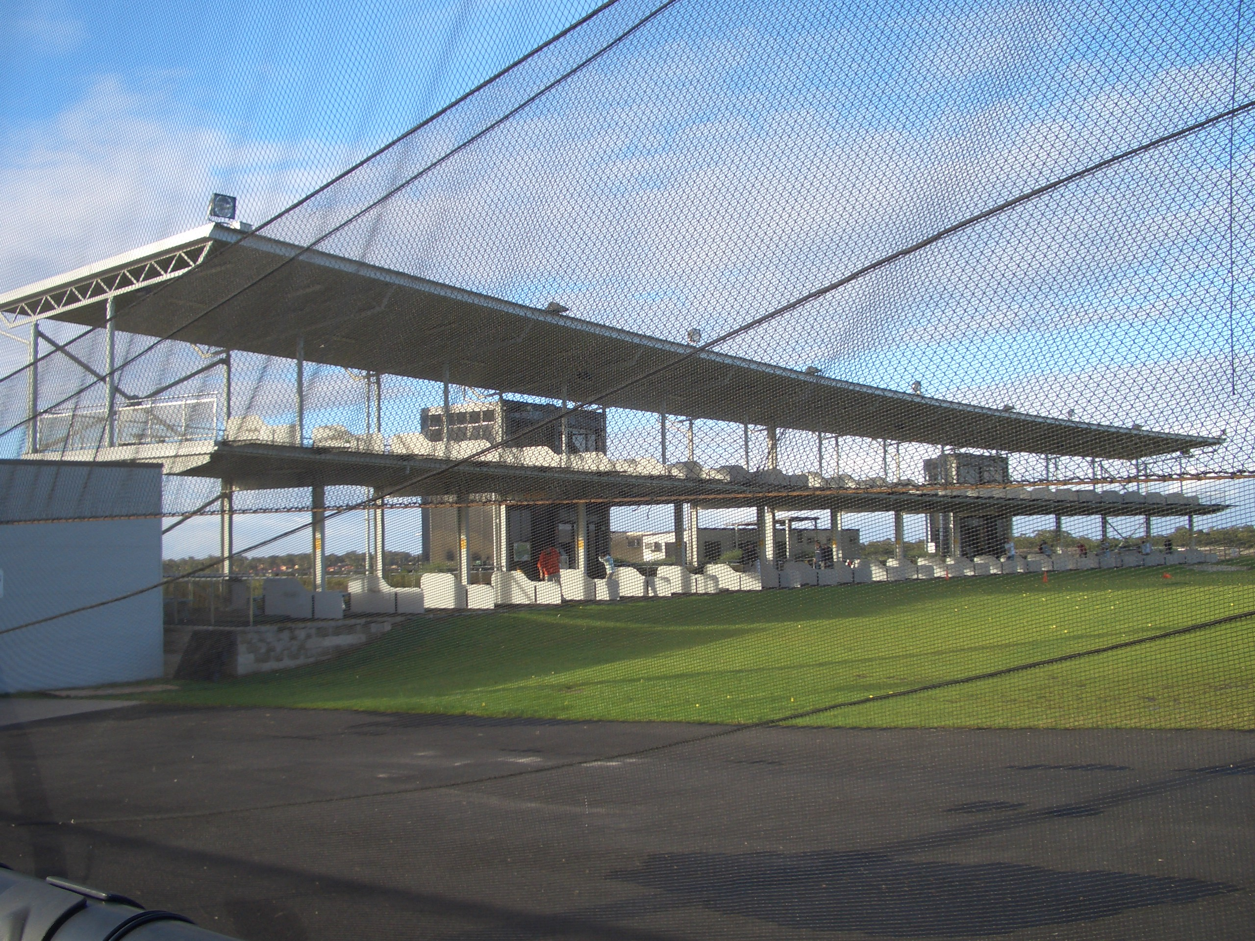 Barden Ridge_Golf Driving Range